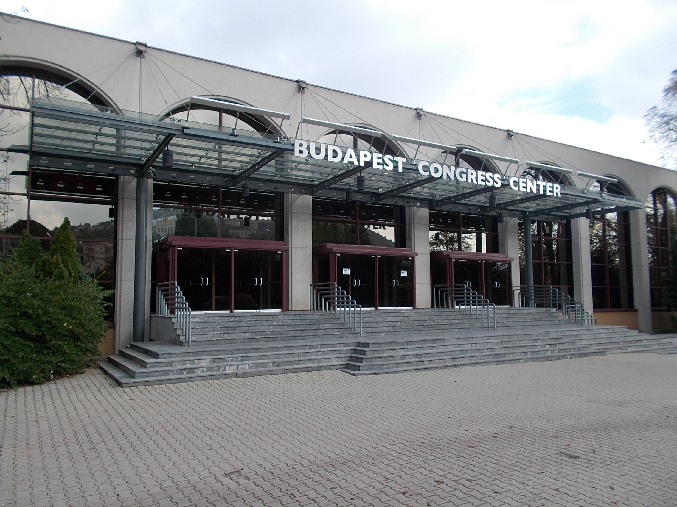 A Budapest Kongresszusi Központ épülete 1984-ben épült Finta József tervei alapján. - Magyarország, Budapest, XII. kerület, Jagelló út 1-3